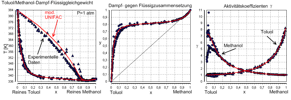 Methanol+Toluol-VLE nachgerechnet mit dem UNIFAC-Modell